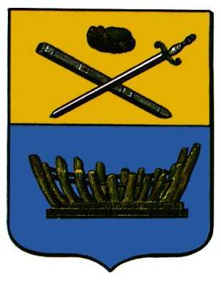 Герб Касимова, Рязанская область